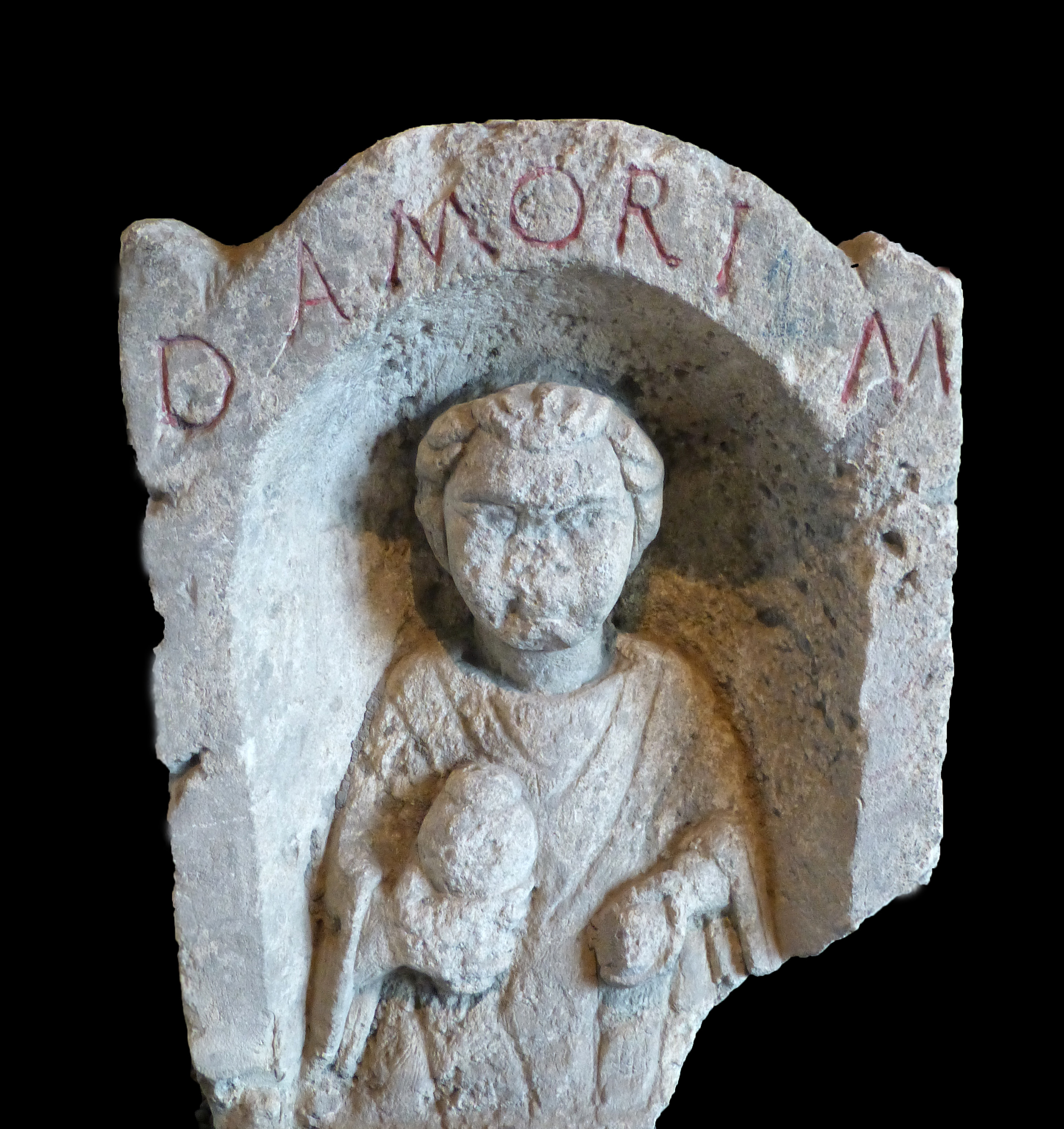 Abbaye Saint-Germain d'Auxerre : stèle funéraire Amorus en calcaire trouvée à Entrains (Nièvre), cimetière gallo-romain. Inscription : D. M. Diis Manibus. Inventaire n° XXIX